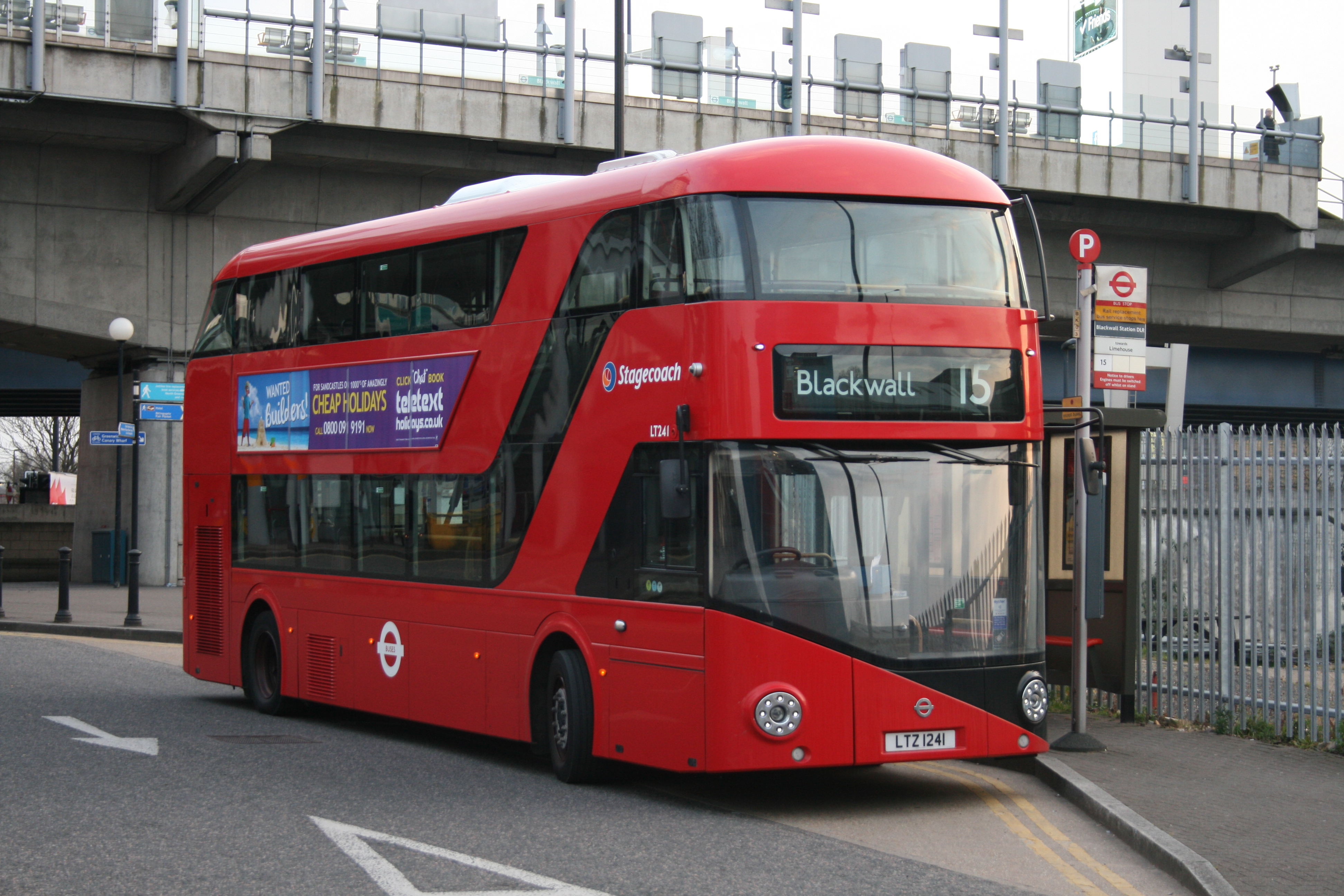 LTZ1241